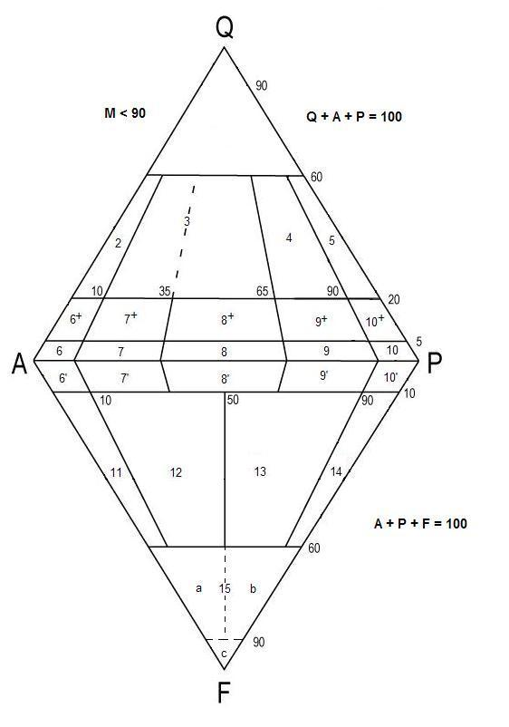 QAPF dla skał wulkanicznych (ponumerowane pola bez przypisów)